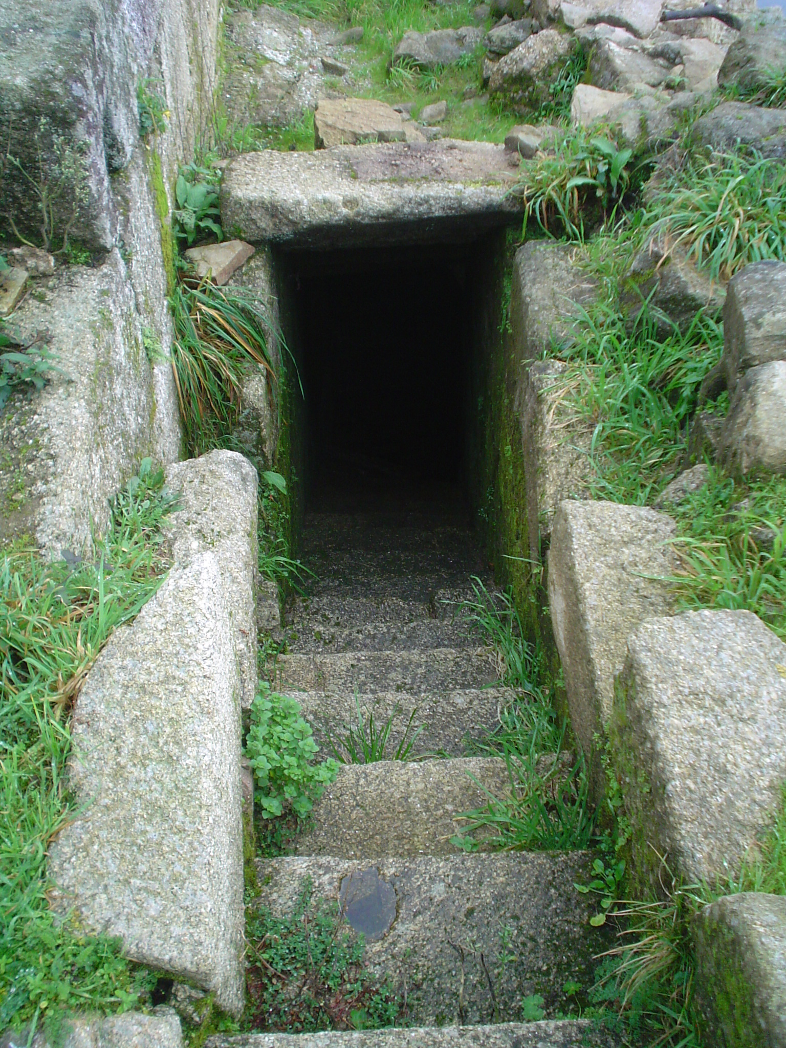 Castelo da Rocha forte. Conxo - Santiago.